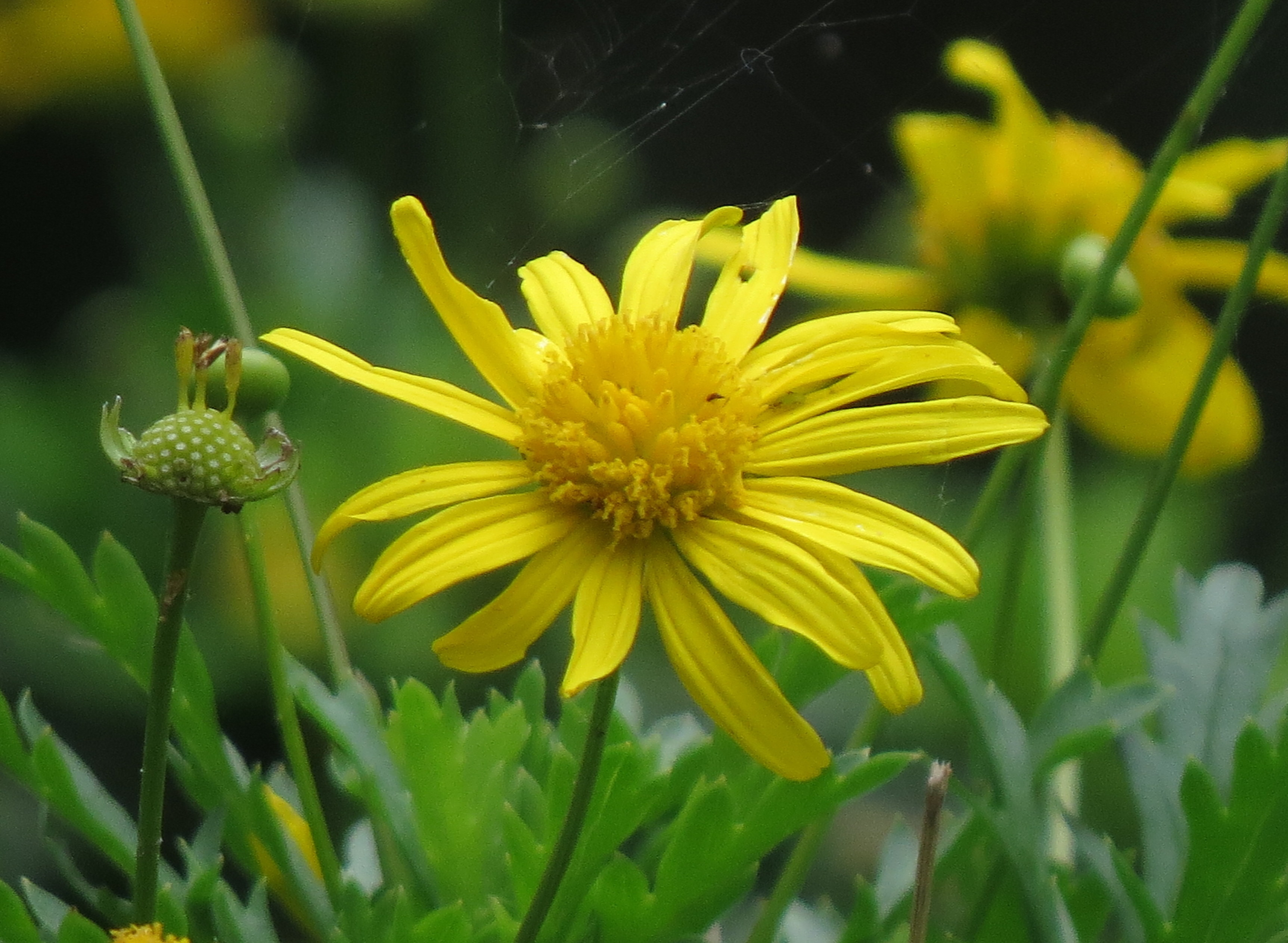 Margaritón - Margarita amarilla (Euryops chrysanthemoides)